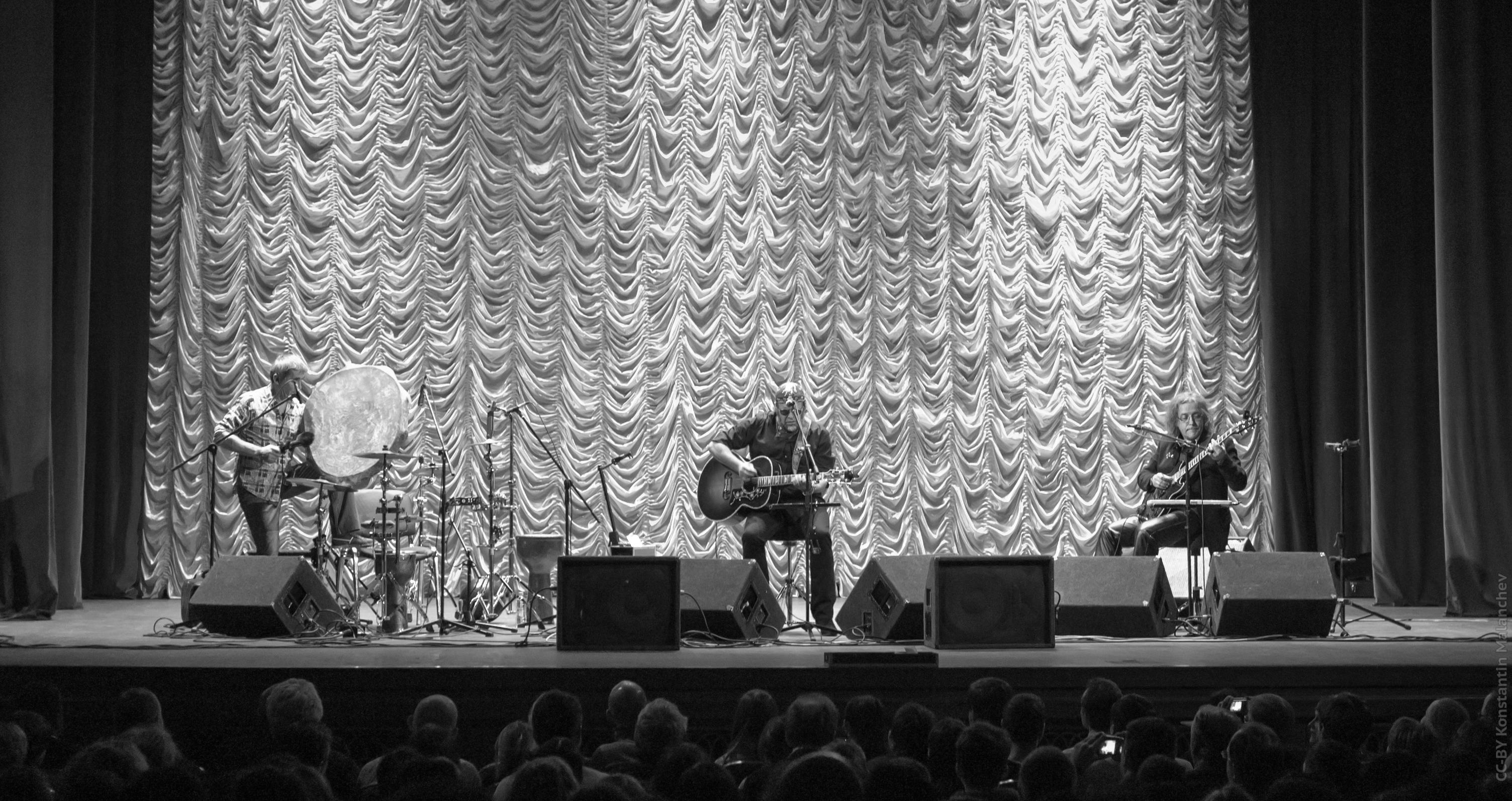 Boris Grebenshchikov in MSU